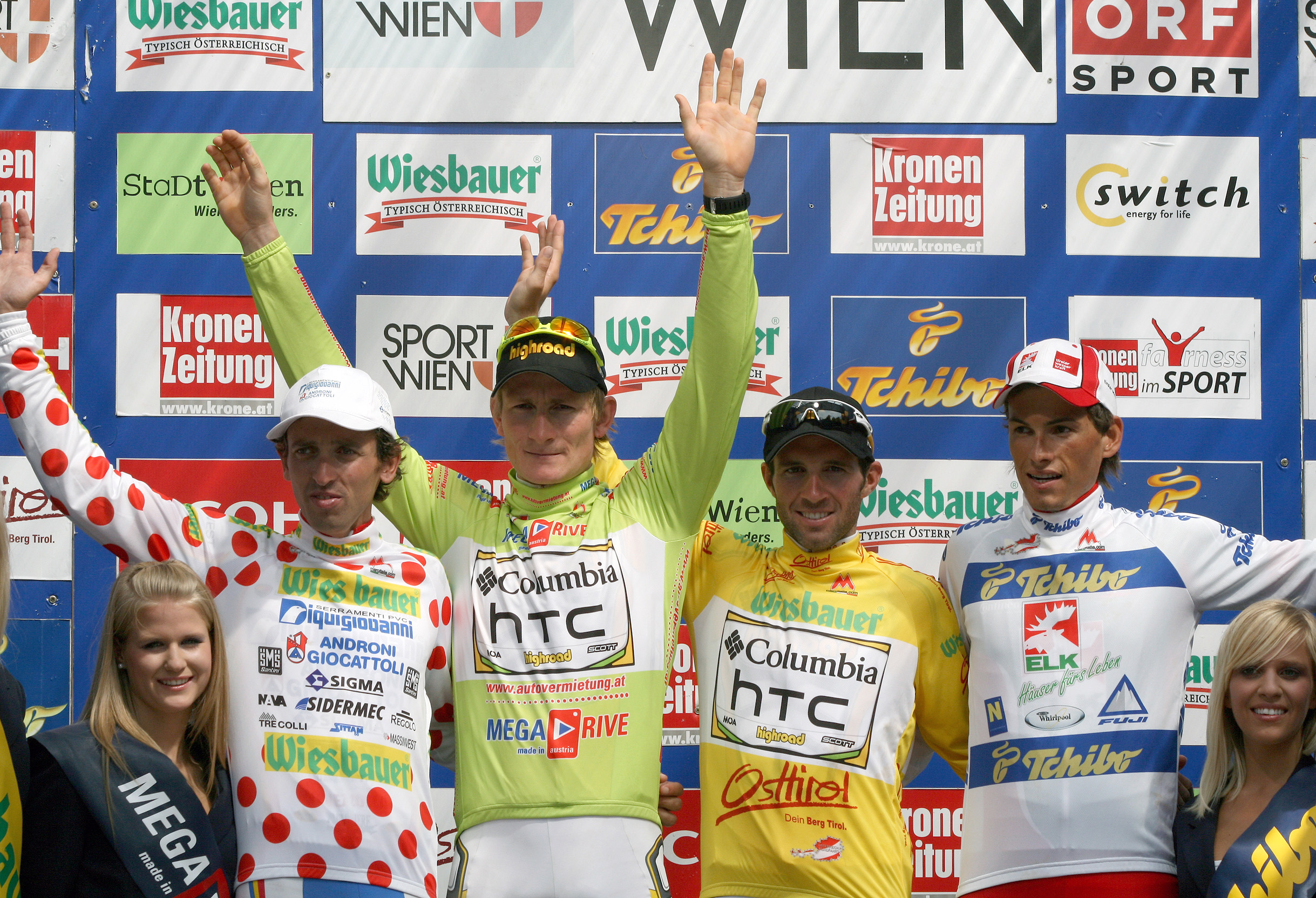 Österreich-Rundfahrt 2009: Leonardo Bertagnolli (Sieger der Gesamt-Bergwertung), André Greipel (Sieger der Gesamt-Punktewertung), Michael Albasini (Gesamtsieger) und Stefan Denifl (bestplatzierter Österreicher der Tour)